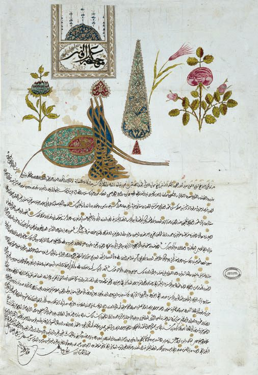 Fermân (Erlass) des osmanischen Sultans Mahmud I. mit besonders reich illuminierter Tughra. Konusu: Mora Adası'ndaki Anabolu Kazâsı'na bağlı beş adet köy ahâlîsinden, Termiş Tuzlası'nda çalıştıklarından dolayı vergi alınmamasına dâir.